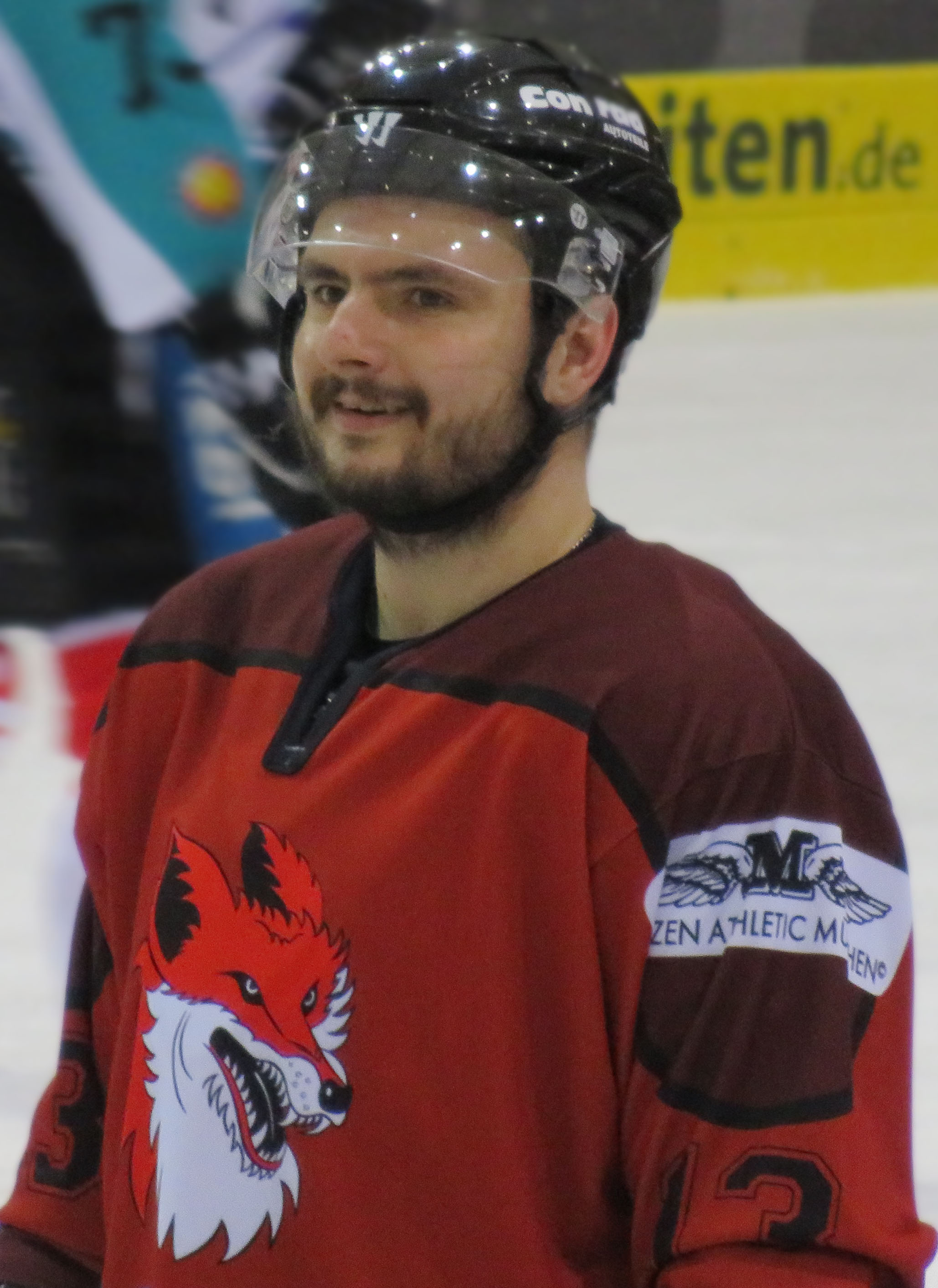 Lars Groezinger